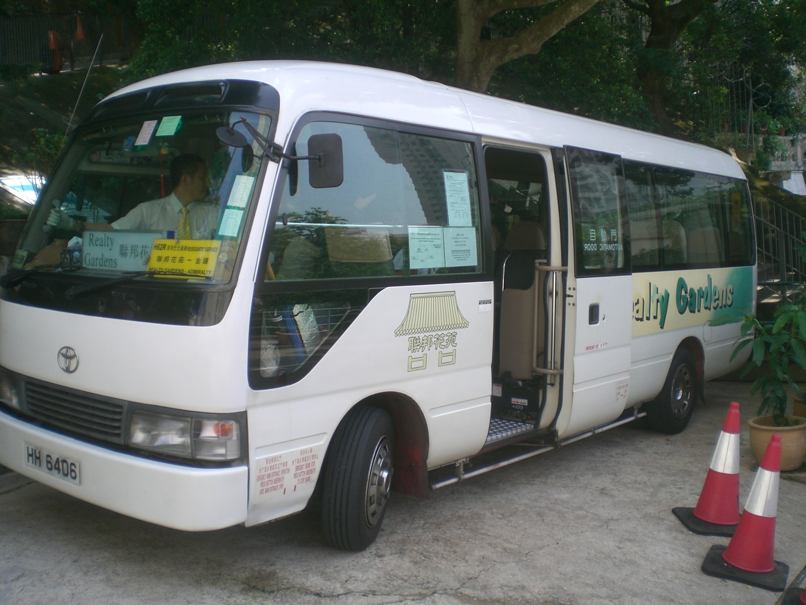 香港島西半山區聯邦花園屋苑穿梭巴士